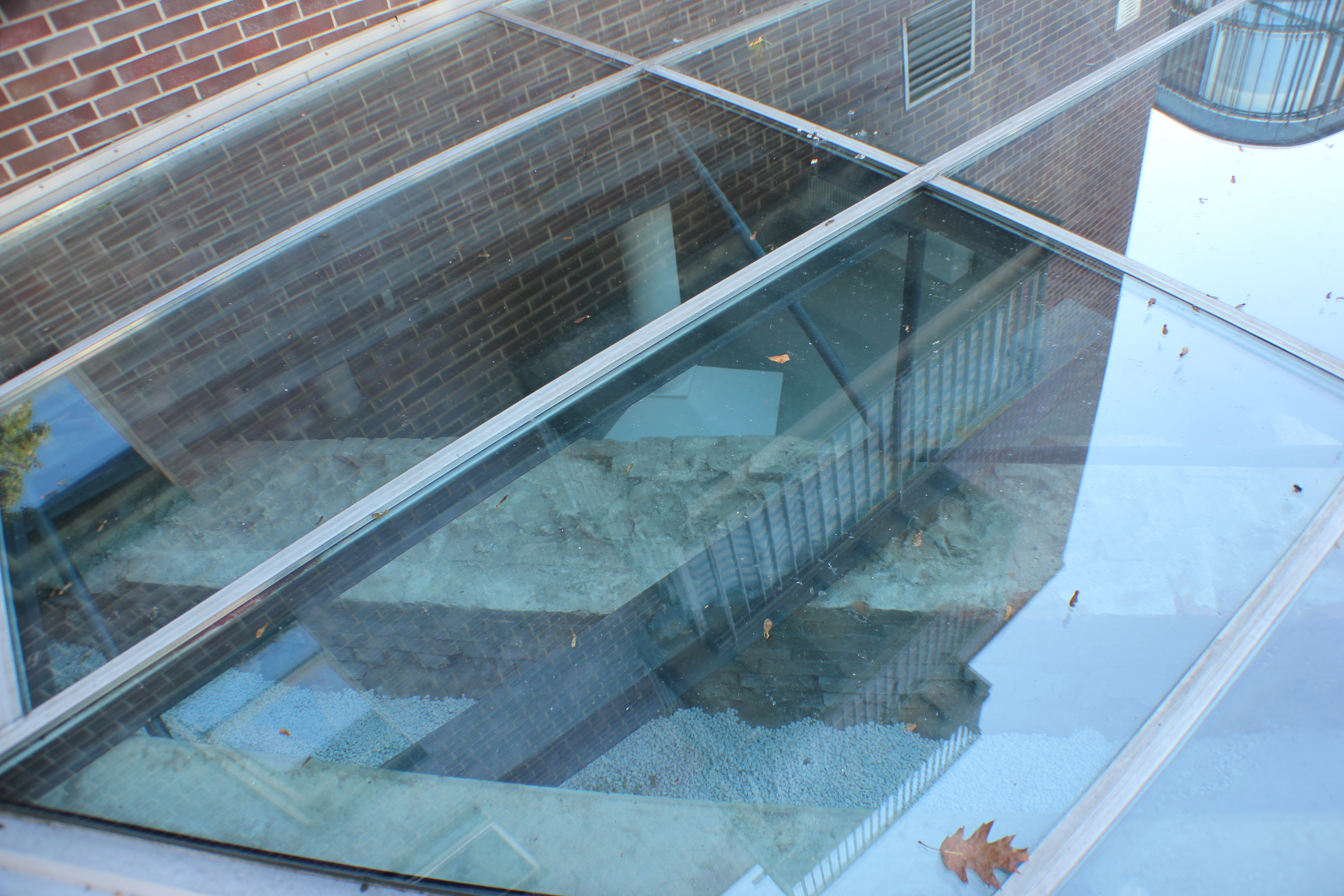 Stadtmauer beziehungsweise Klostermauer unter dem Glasdach (Rote Straße, Flensburg), drittes Bild